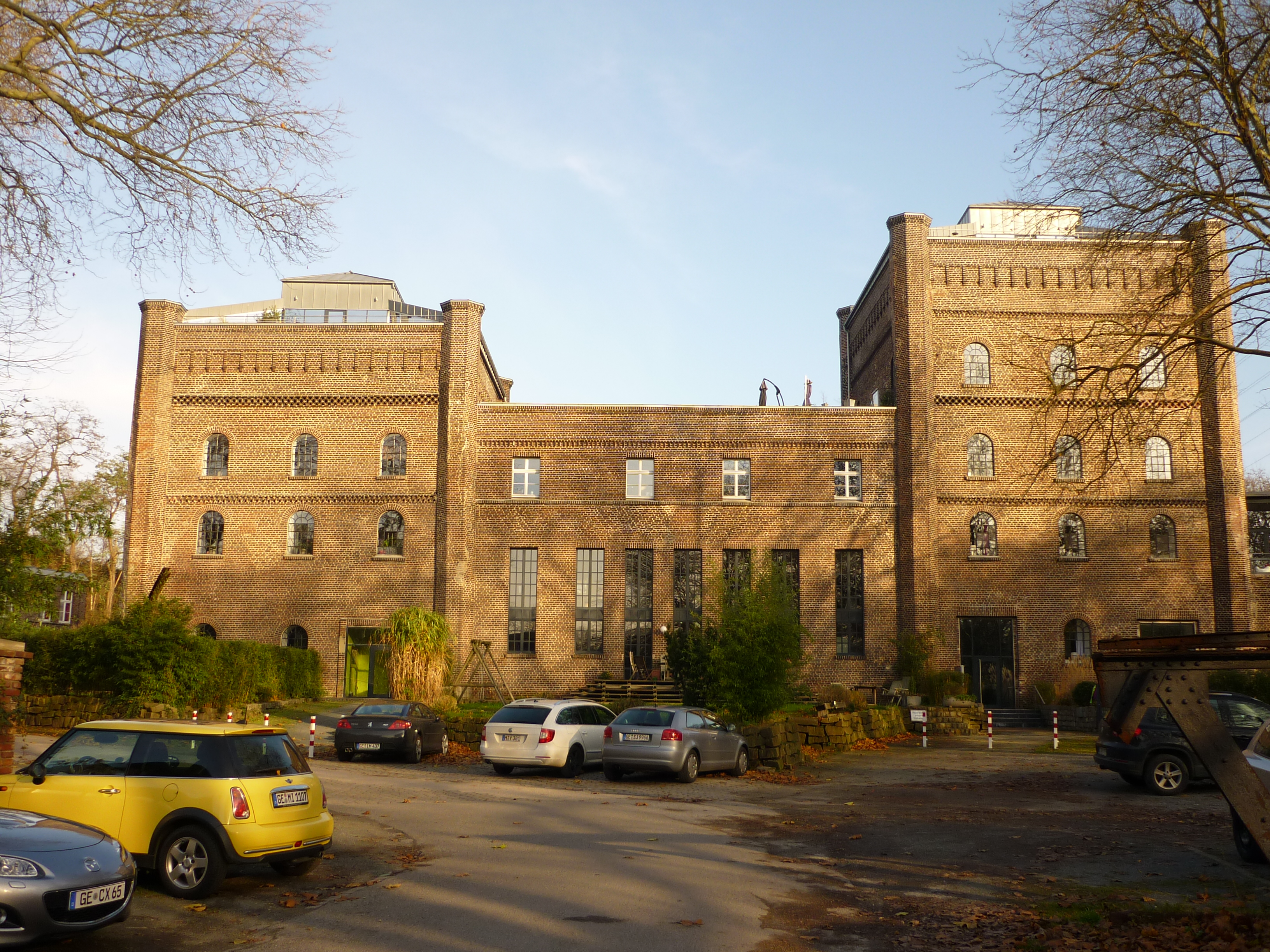 Doppelmalakowturmanlage Holland I/II